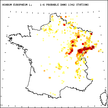 (en) European Ginger Root (Asarum europaeum L.), a map originating of the internet site The accord of the autor, H. Brisse, is here. (fr) Asaret d'Europe (Asarum europaeum L.), une carte issue du site internet L'accord de l'auteur, H. Brisse, se situe ici. (de)Europäische Haselwurz, (it)Baccaro comune, (nl)Mansoor